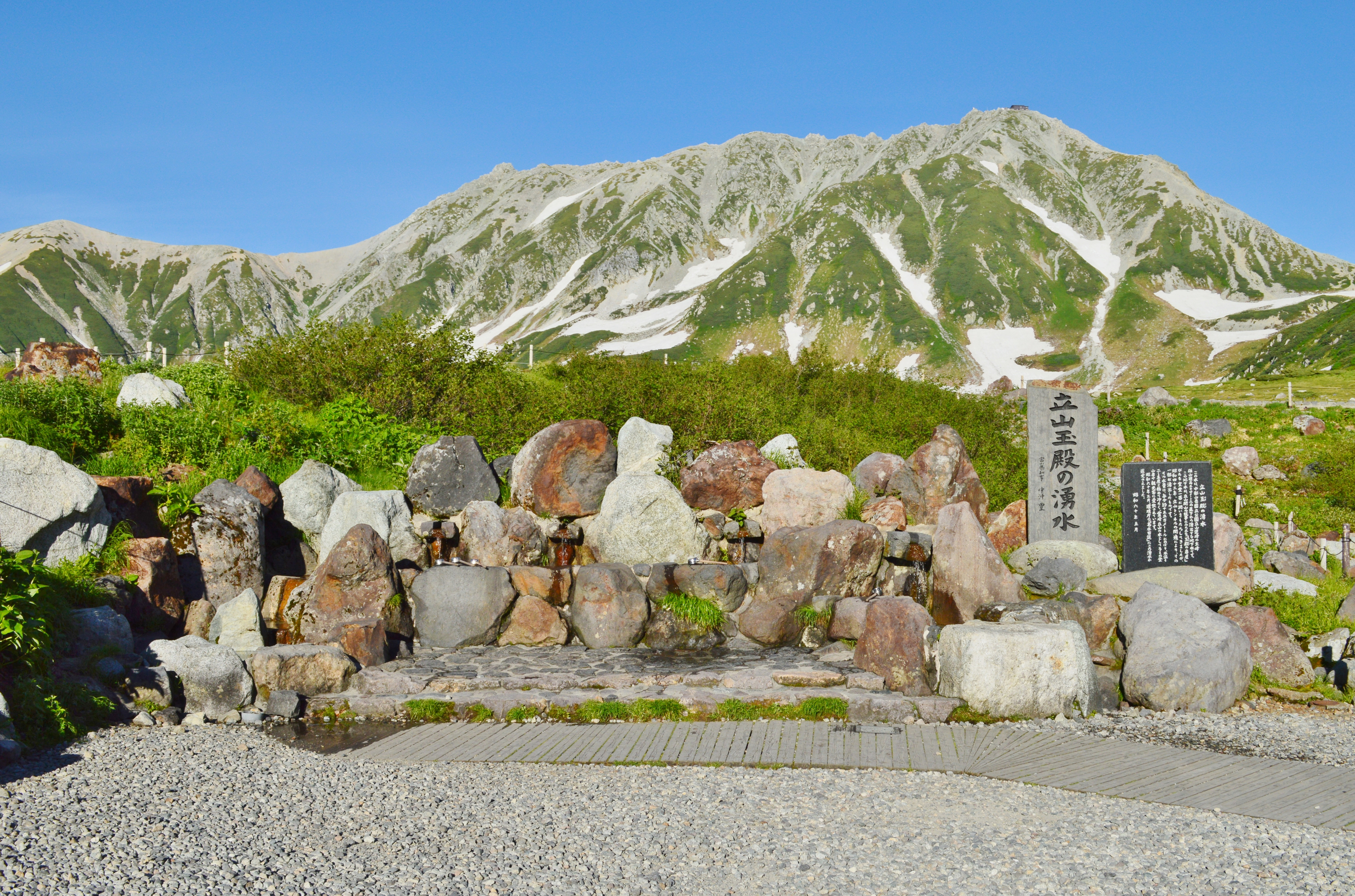 立山玉殿の湧水と立山